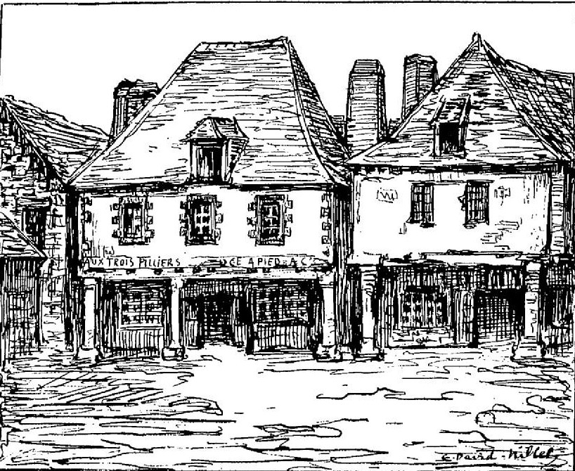 L'hôtel des Trois Piliers au Faouët où se réunissait la bande de Marion du Faouët (détruit en 1878).